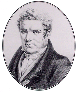 French botanist and orthinologist Jean Baptiste Leschenault de La Tour (1773-1826)